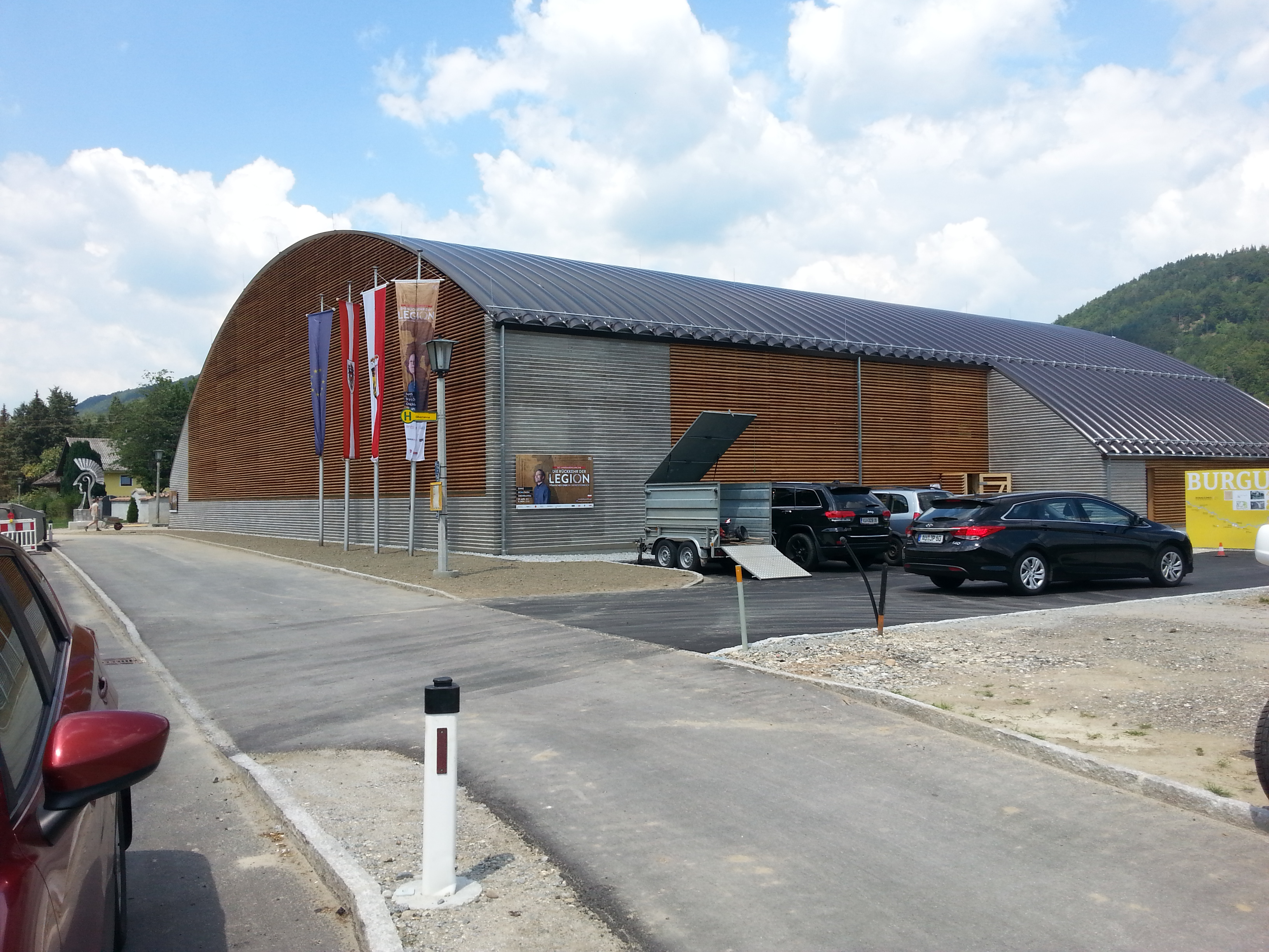 Der 2018 fertiggestellte Schutzbau über der Ruine des Burgus von Oberranna, Österreich.